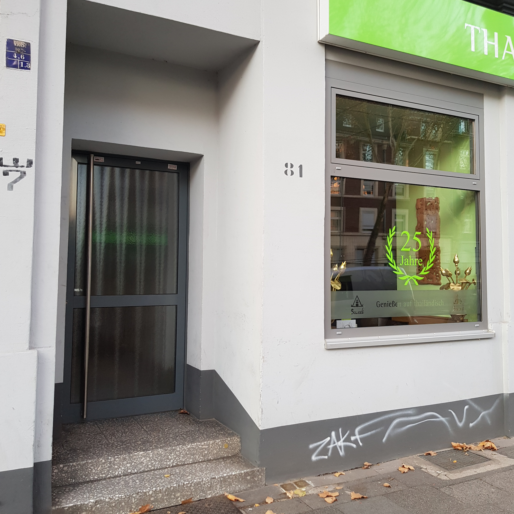 Stolpersteine an der Mülheimers. 81, 47058 Duisburg